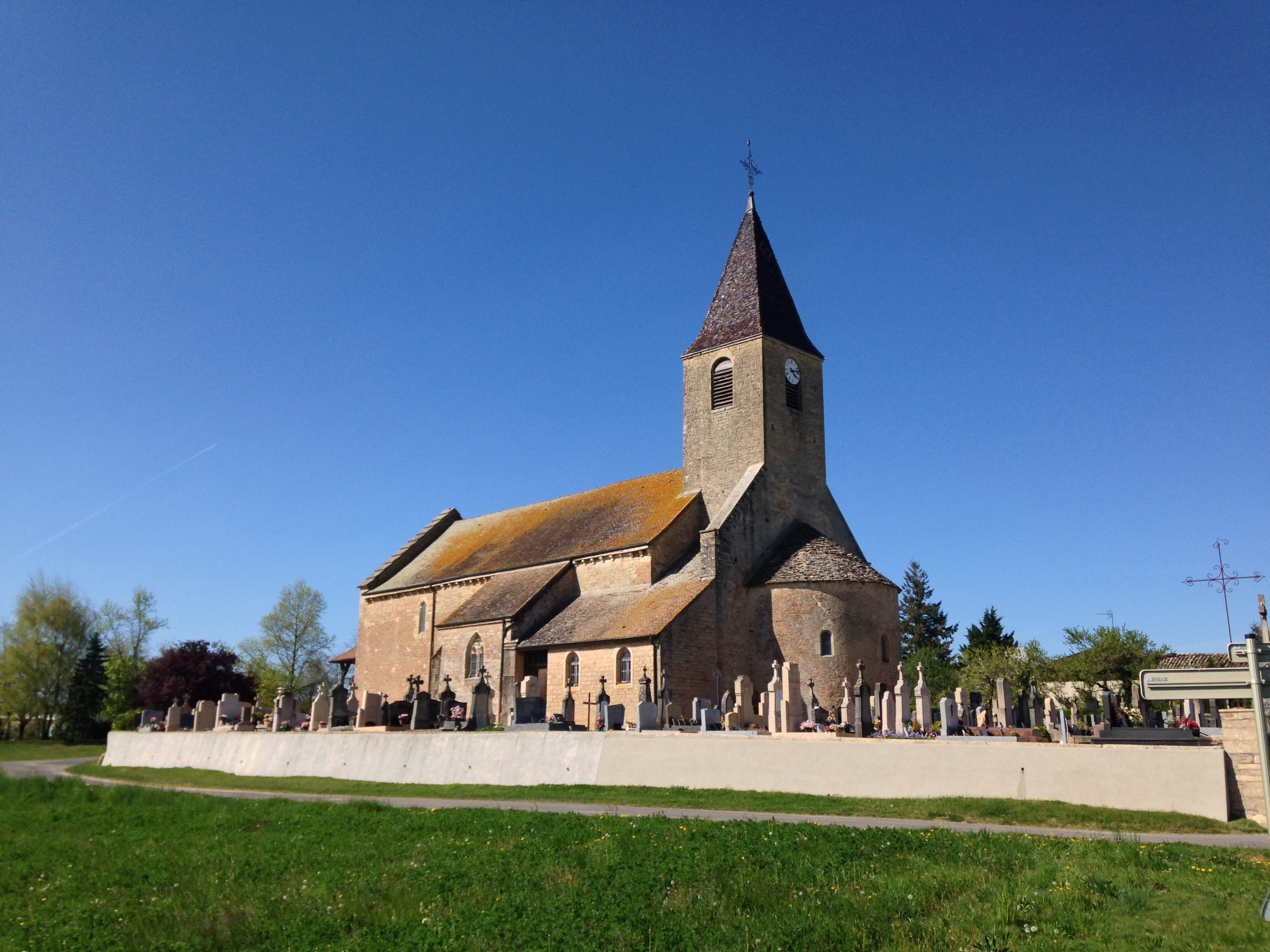 Vue sur l'église de Chevroux